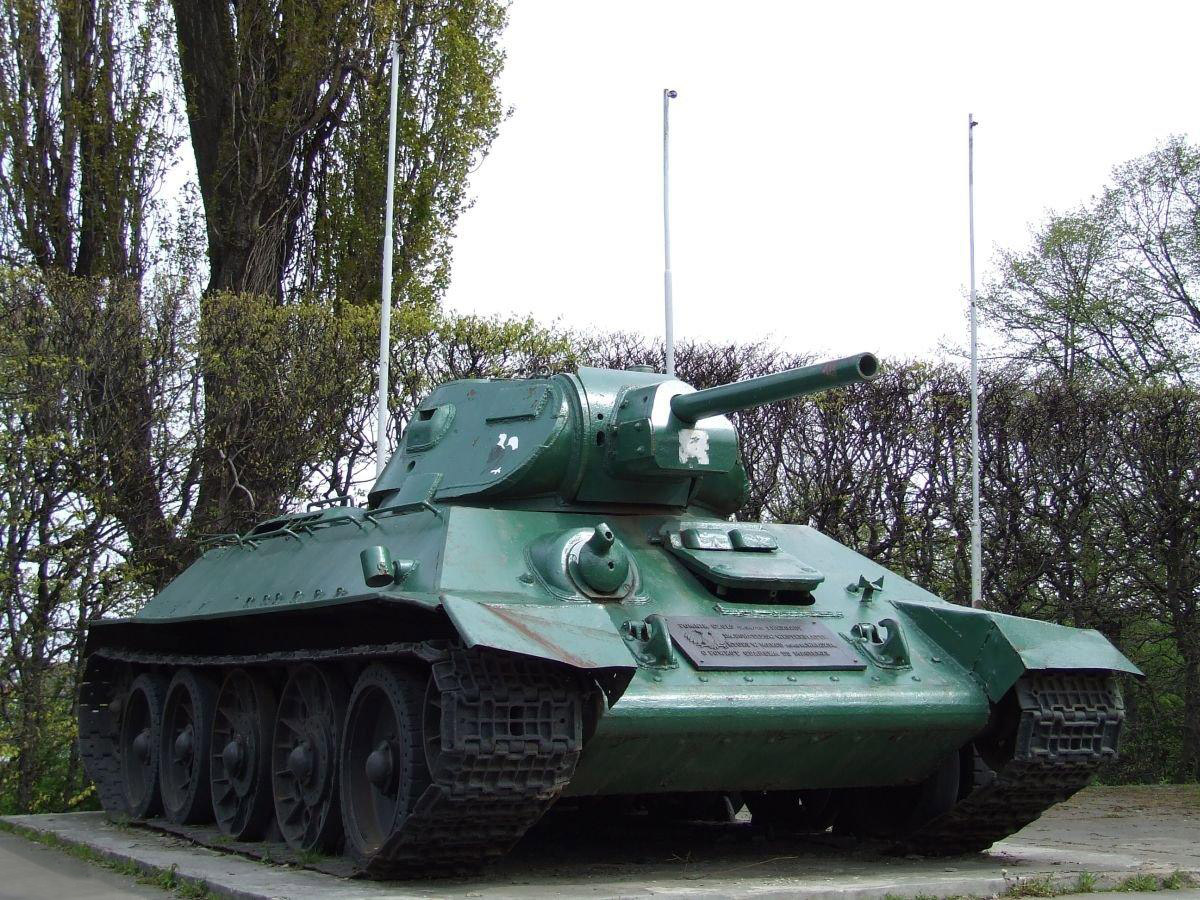 Jedyny z trzech czołgów - pomników, jaki pozostał w Gdańsku. Widok od strony Wrzeszcza